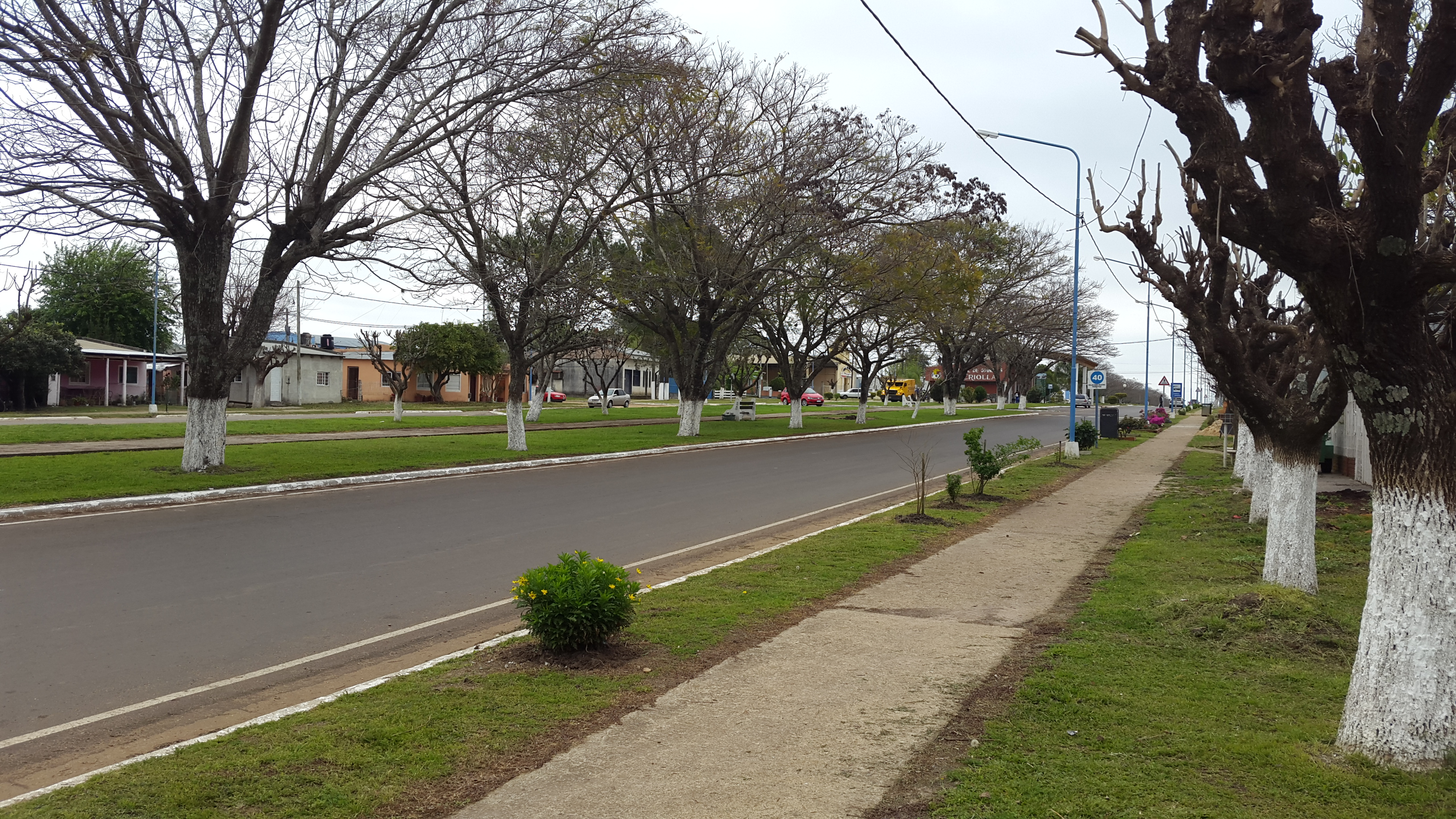 Foto de la avenida principal de la localidad de La Criolla, Entre Ríos, en invierno.